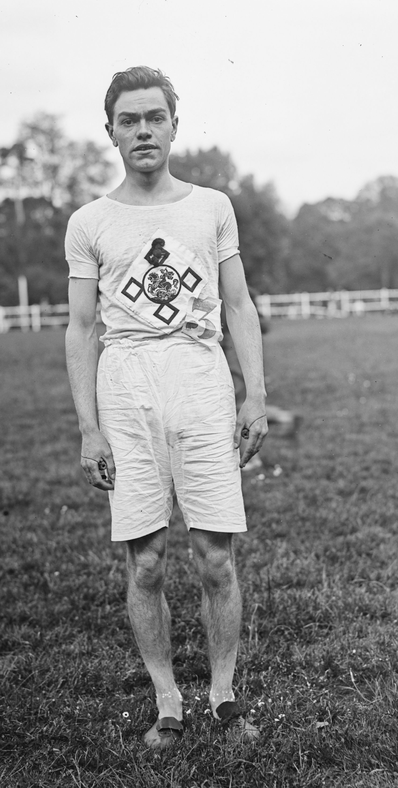 Ripley, vainqueur du 400 m match d'athlétisme entre le Stade Français et les Polytechnic Harriers de Londres au stade de la Faisanderie à Saint-Cloud, le 11 mai 1924.